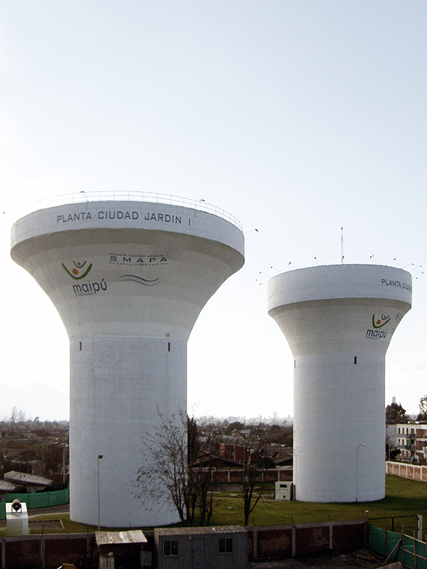 Dos torres de agua pertencientes a la "Planta Ciudad Jardín I" de SMAPA. Ubicados en la villa Los Héroes, en Maipú, Santiago de Chile.